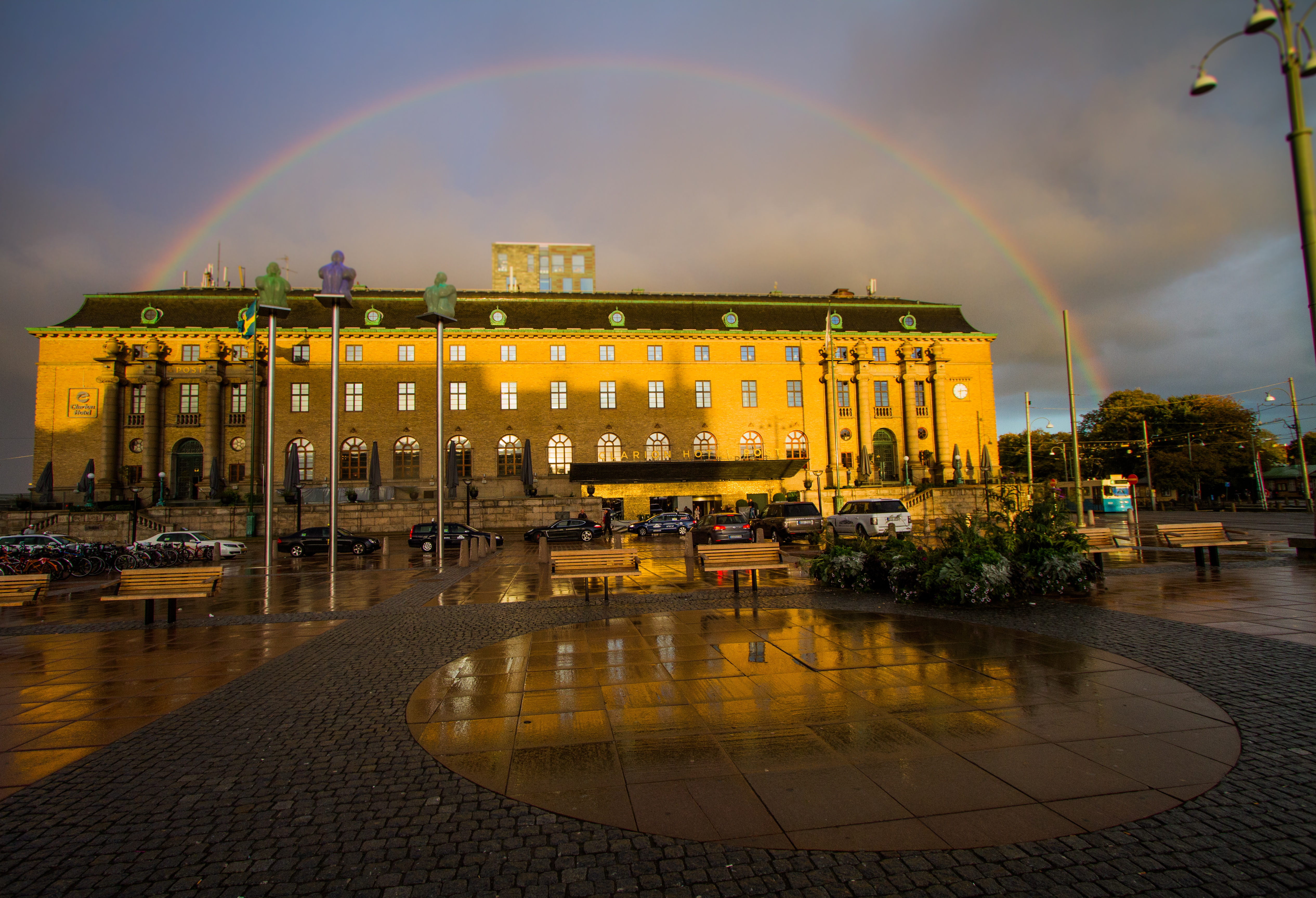 Clarion Hotel Post (fd posthuset) vid Drottningstorget i Göteborg.